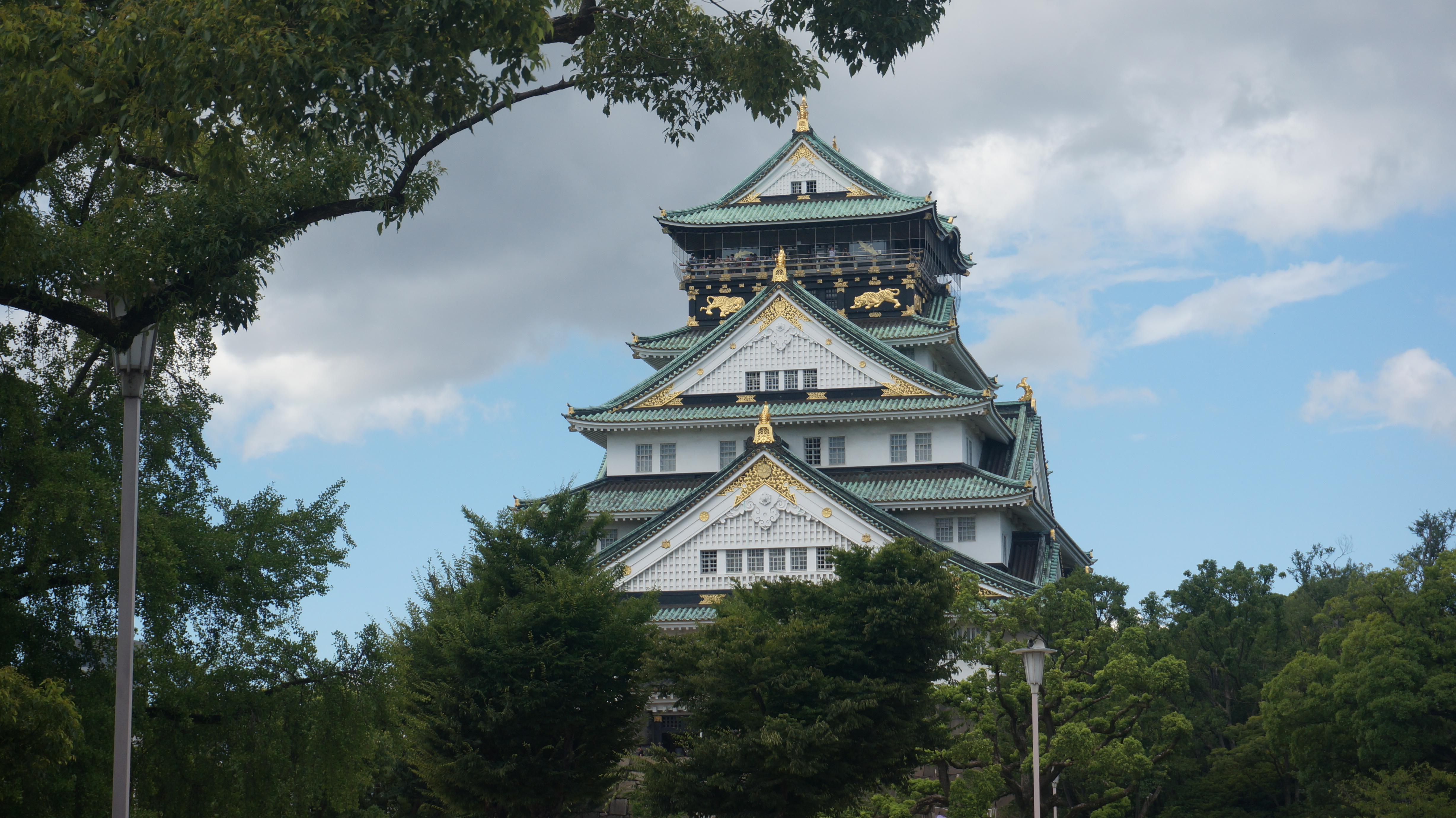 大阪城，2018年7月